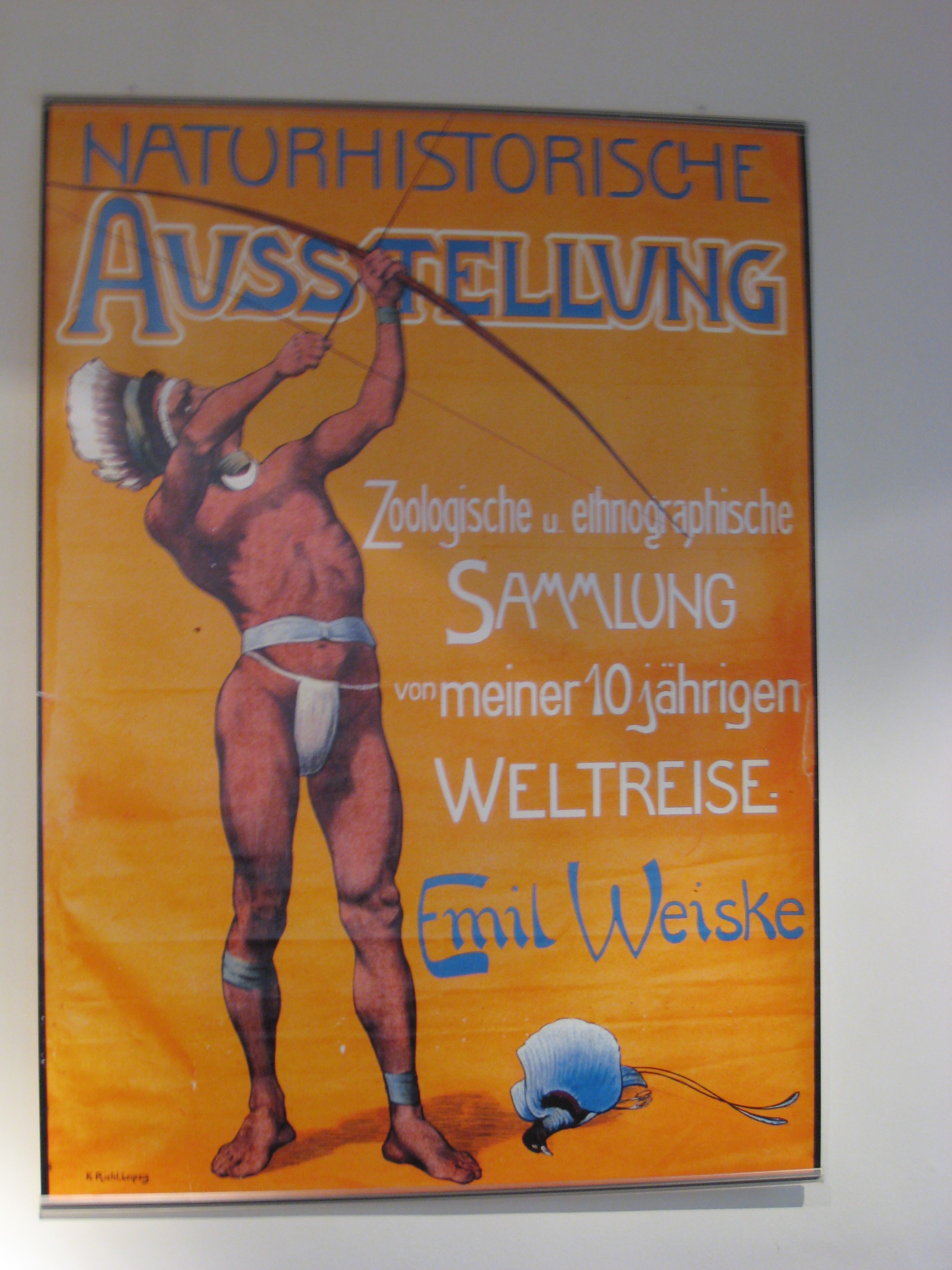 Ankündigung einer Ausstellung der Sammlungen von Emil Weiske, im Stadtmuseum von Saafeld